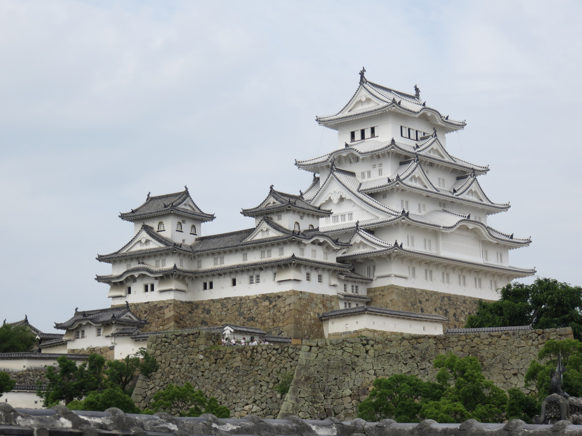 姫路城天守群（平成の修理後）。Himeji Castle Keep Tower (after restoration 2015)